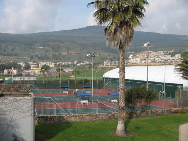 המרכז לטניס בישראל - קרית שמונה